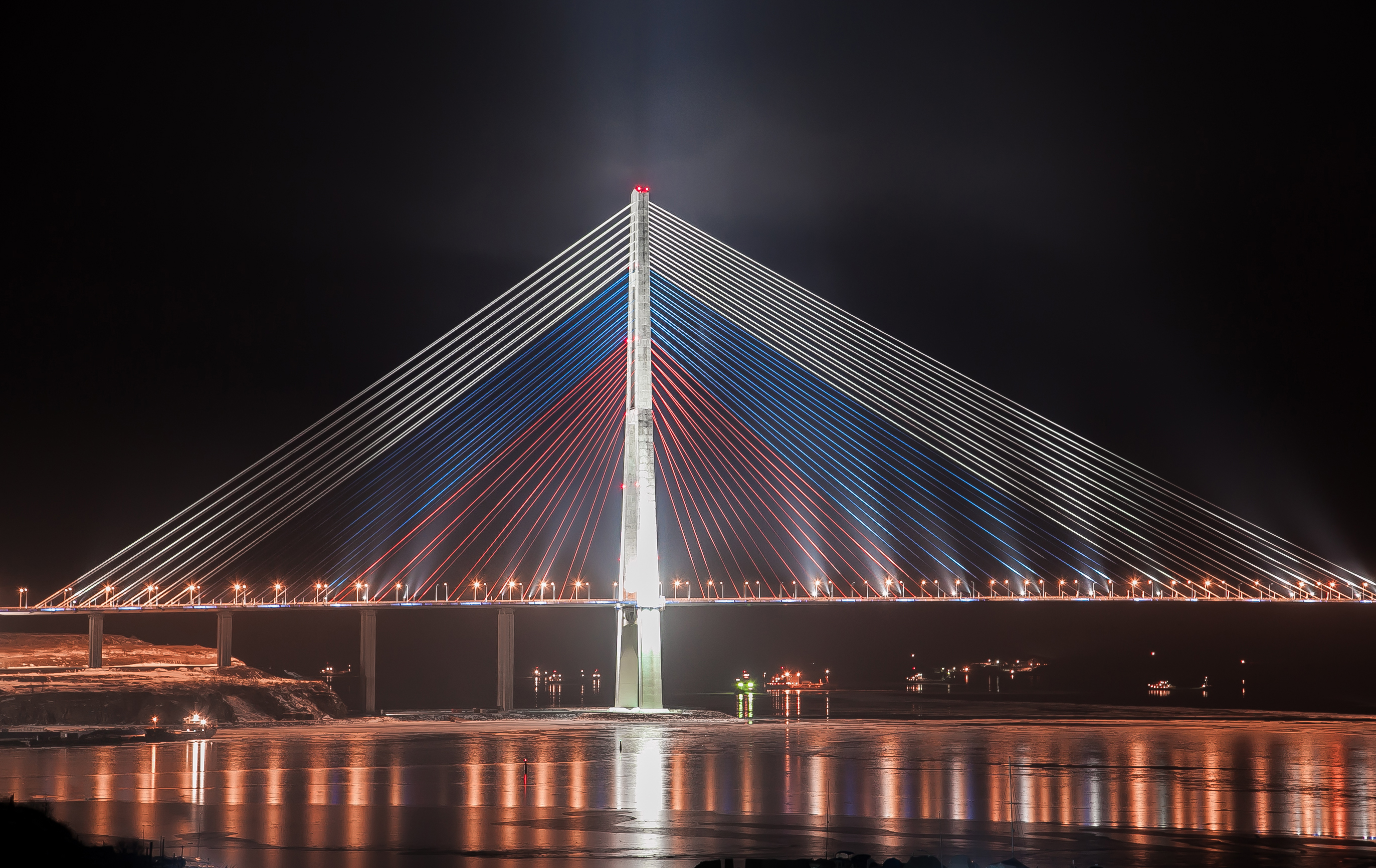 "Russian bridge" in Vladivostok city "Русский Мост" в городе Владивосток